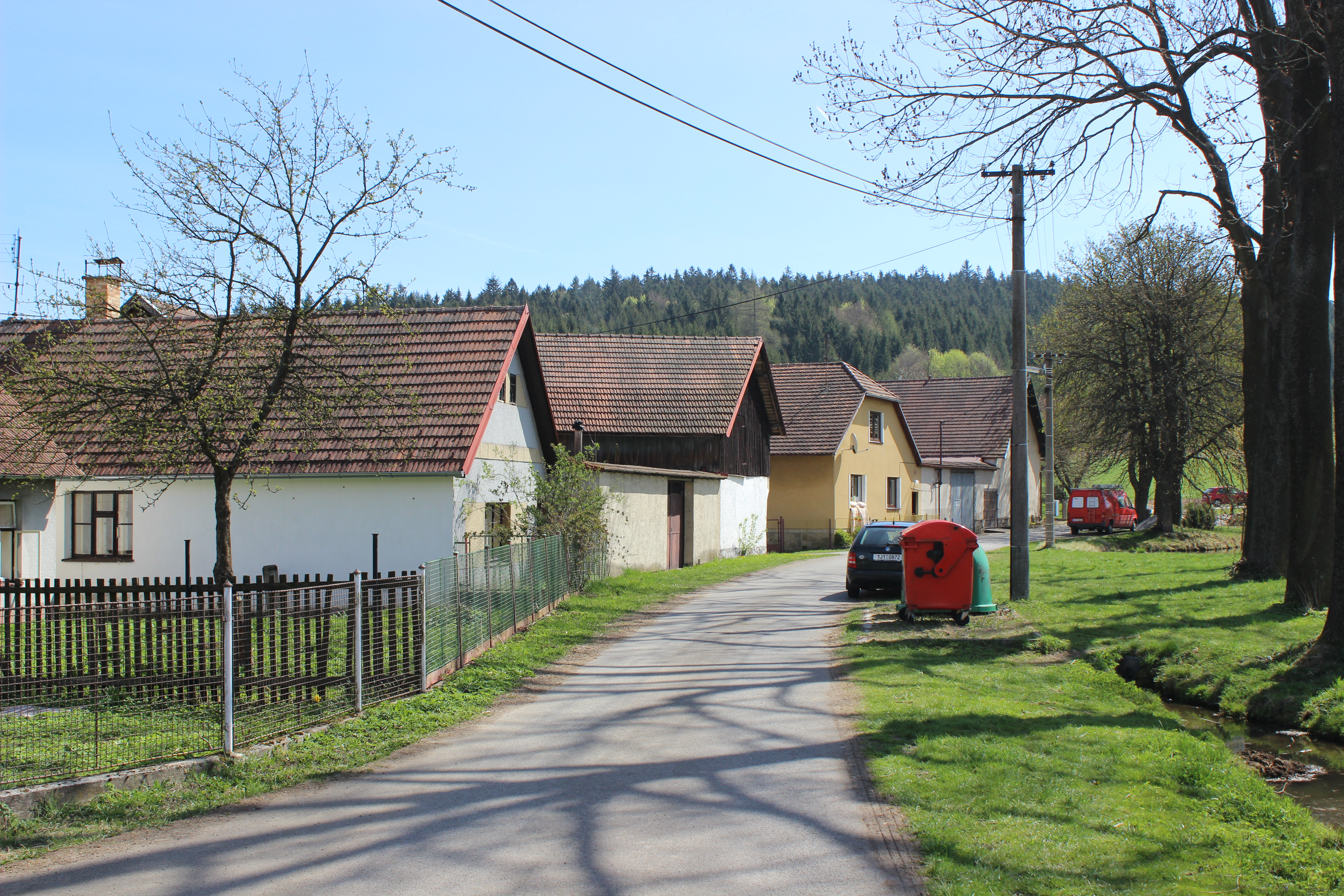 Zástavba v Letnech podél zdejší místní silnice. Project: Fotíme Česko.